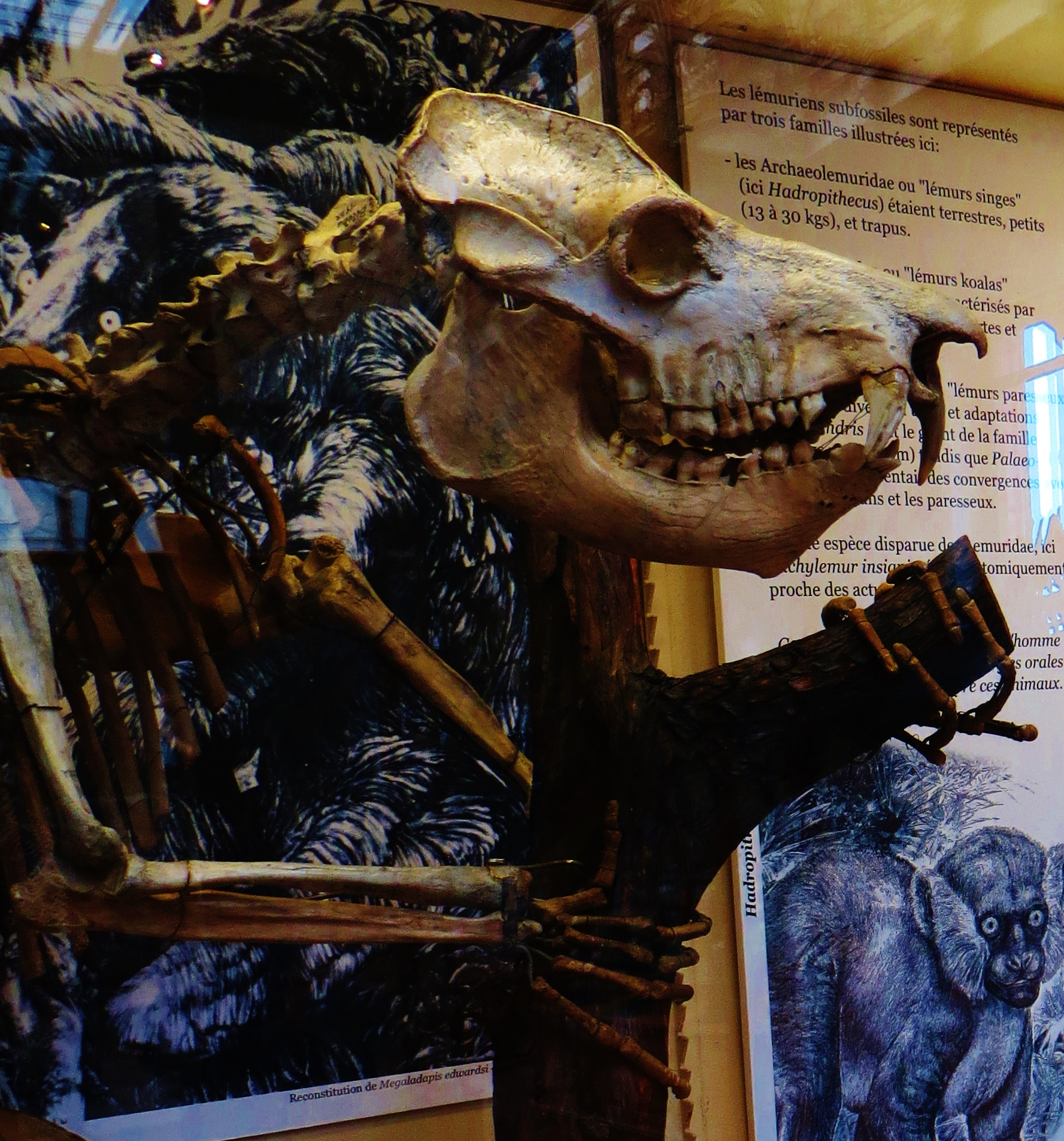 Fossil of Megaladapis, an extinct mammal- Took the photo at Musee d'Histoire Naturelle, Paris